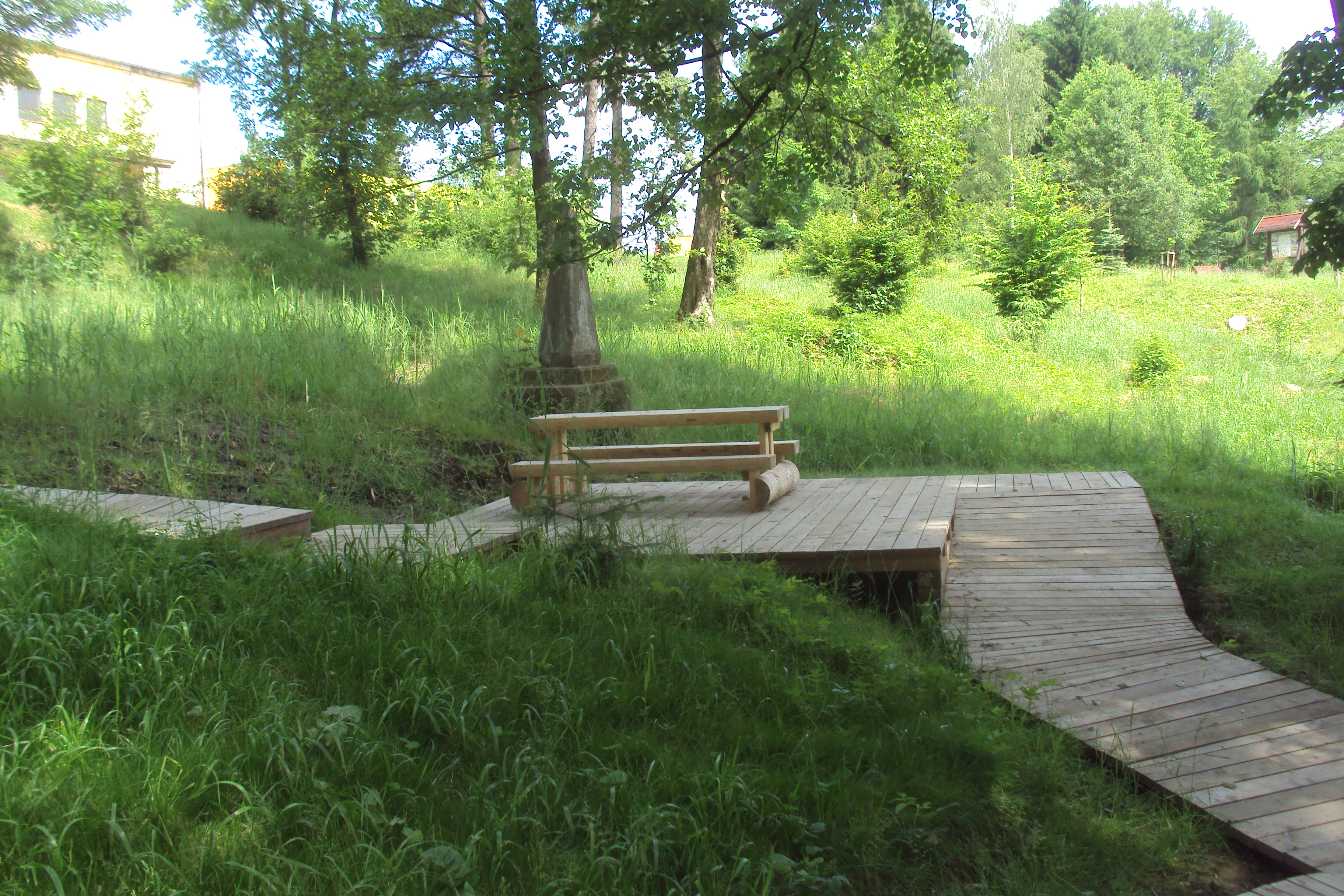 Odpočívadlo v arboretu